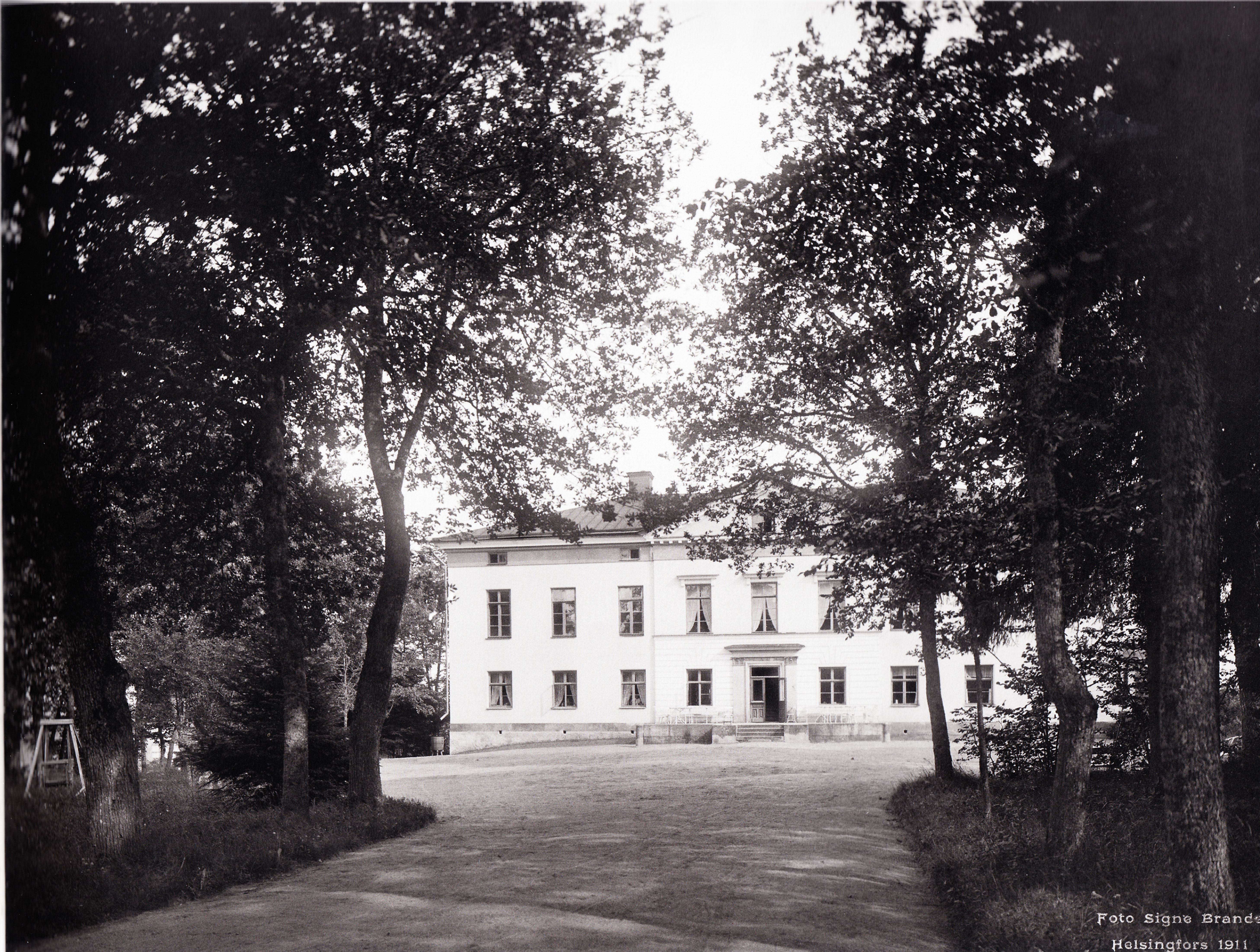 Viurilan kartano Halikossa